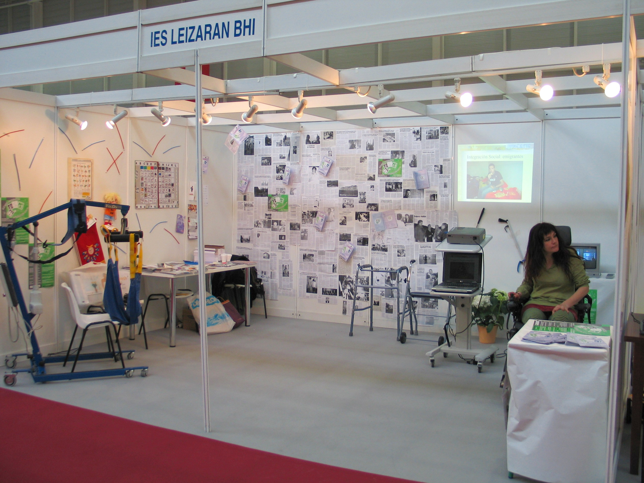 Irungo Ficoban Gizarte Integrazioa azaltzeko stand.